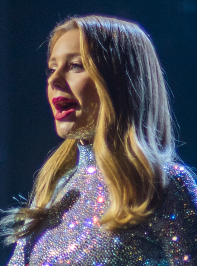 Финал Голос. Дiти 4. Тина Кароль